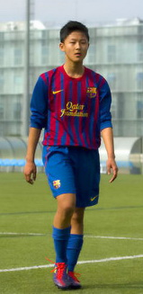 Lee Seung Woo